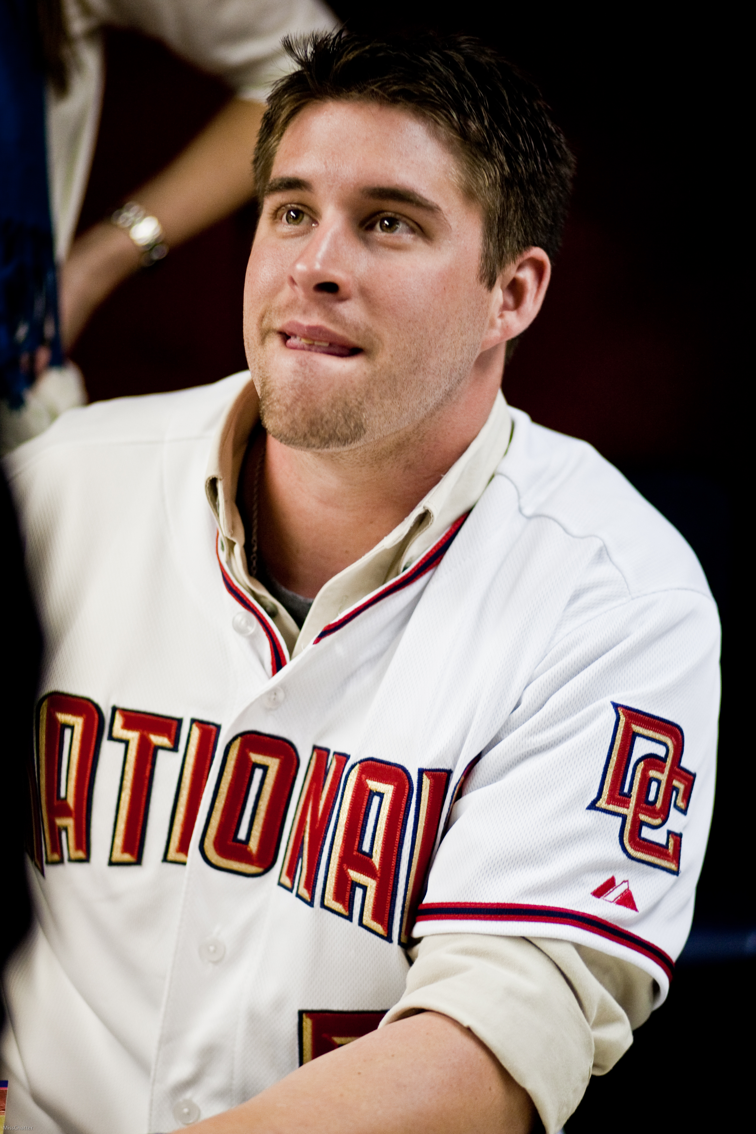 Garrett Mock